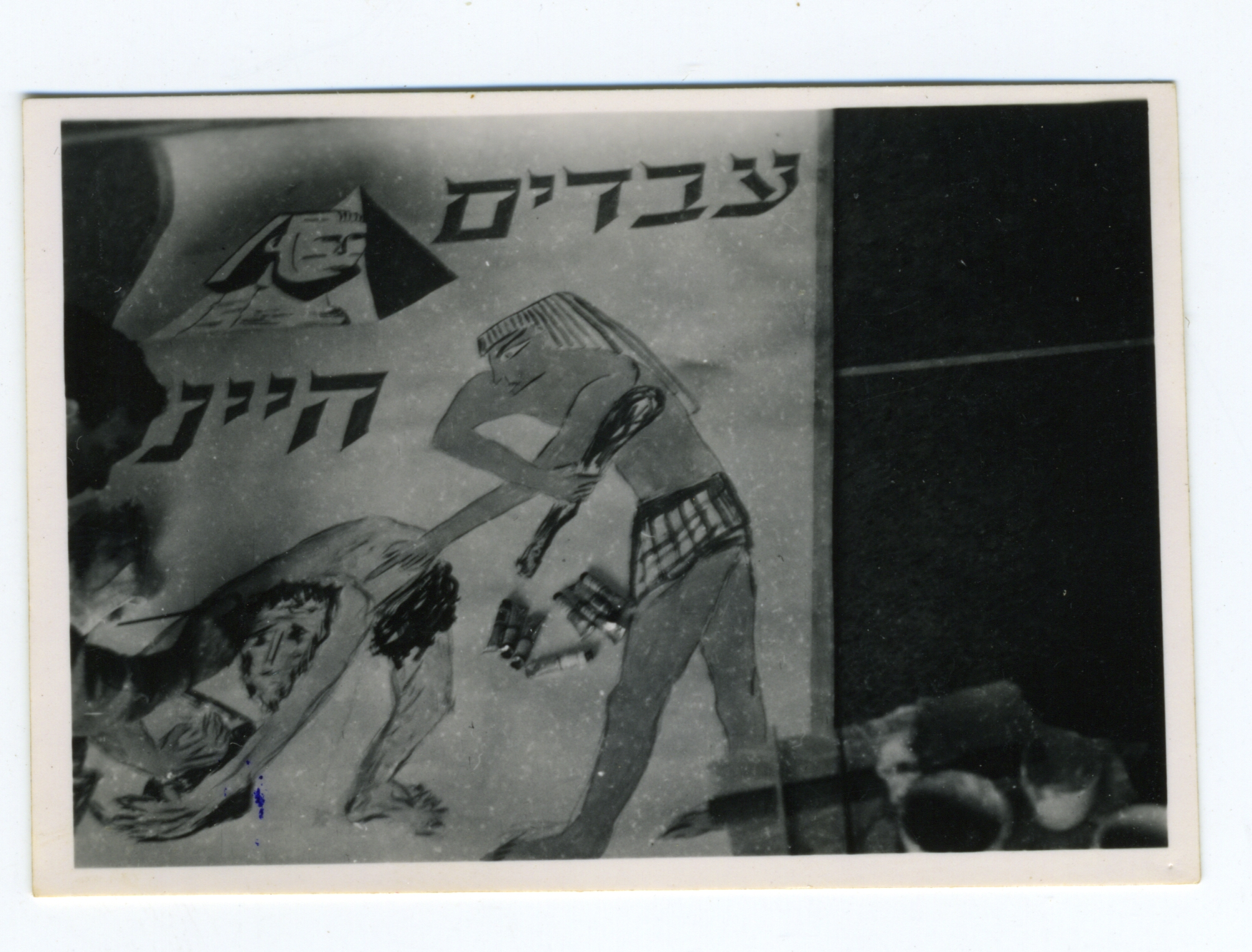 ציור של מקס בינט לכבוד סדר פסח ב- Villa Borghese ברומא, איטליה, אפריל 1949